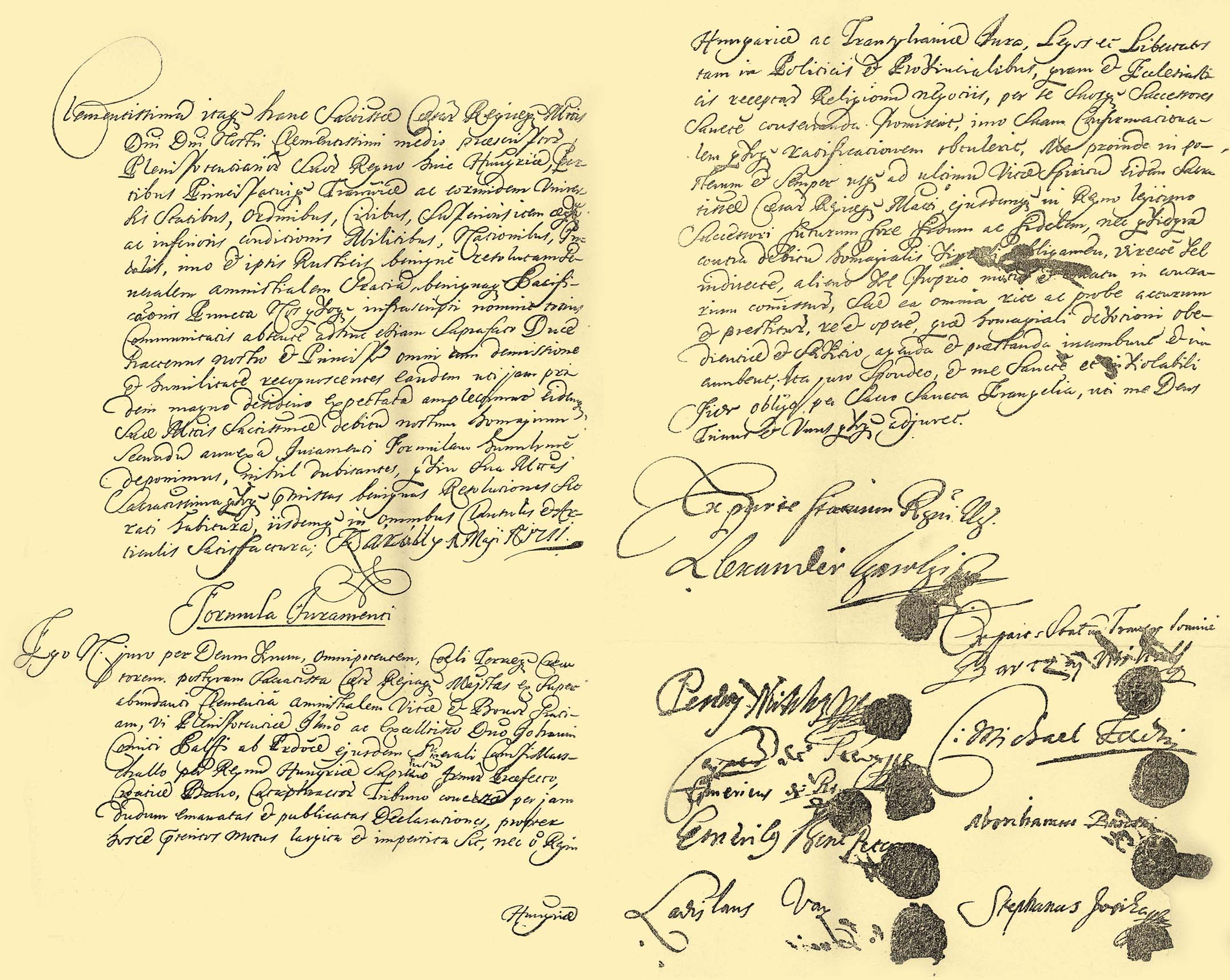 Originalurkunde des Friedens von Sathmar, unterzeichnet am 1. Mai 1711